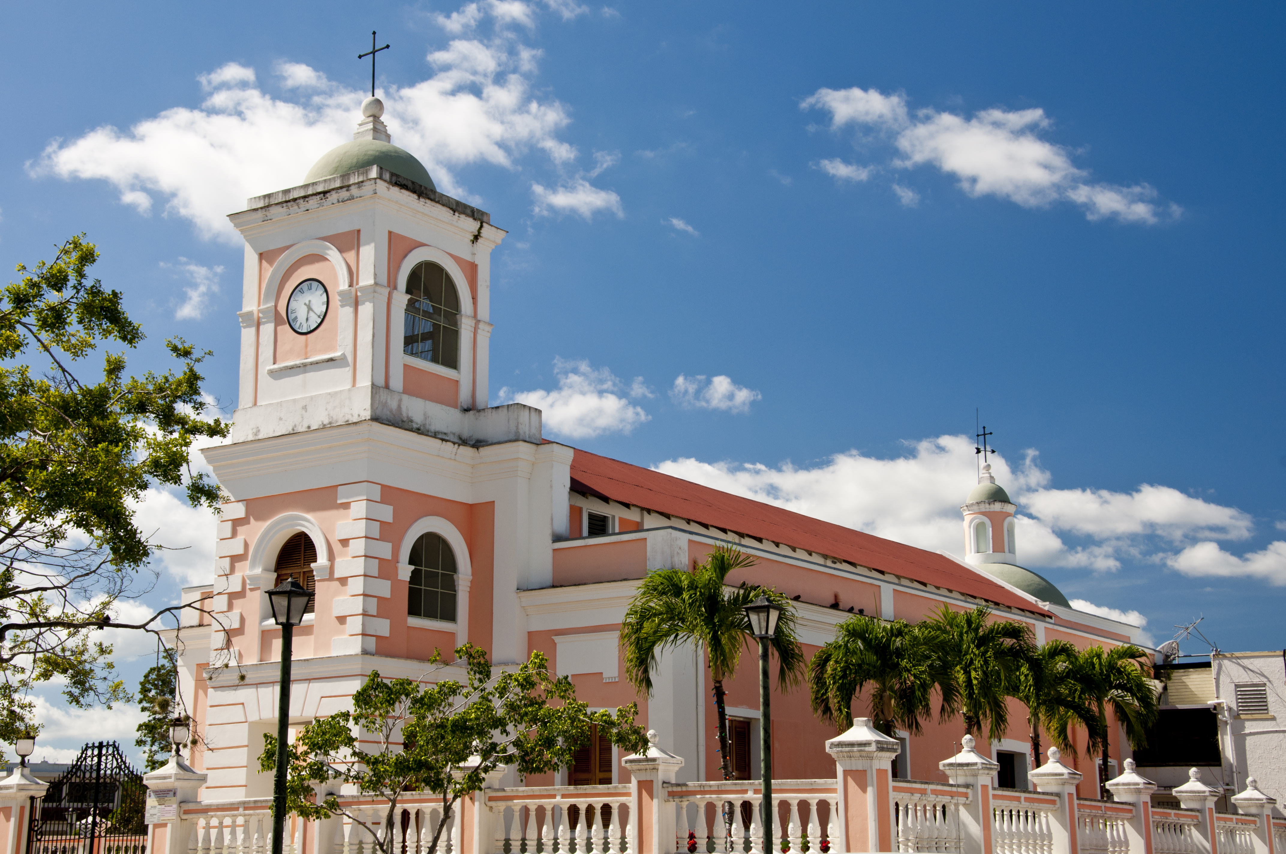 Catedral Santiago Apóstol in Fajardo, Puerto Rico.